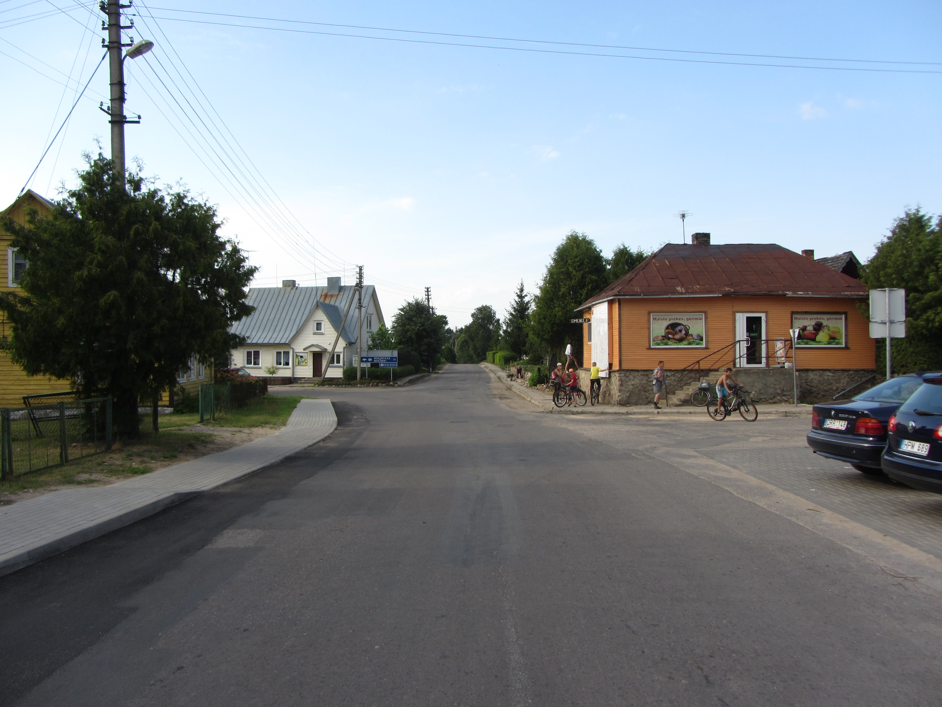 Kapčiamiestis, Lithuania